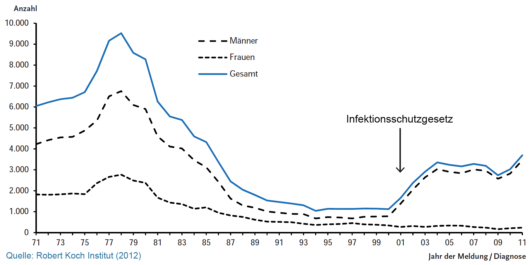 Anzahl gemeldeter Syphilis-Fälle nach Geschlecht und Jahr der Meldung bzw. Diagnose vor und nach Einführung des Infektionsschutzgesetzes (2001), 1971 – 2011